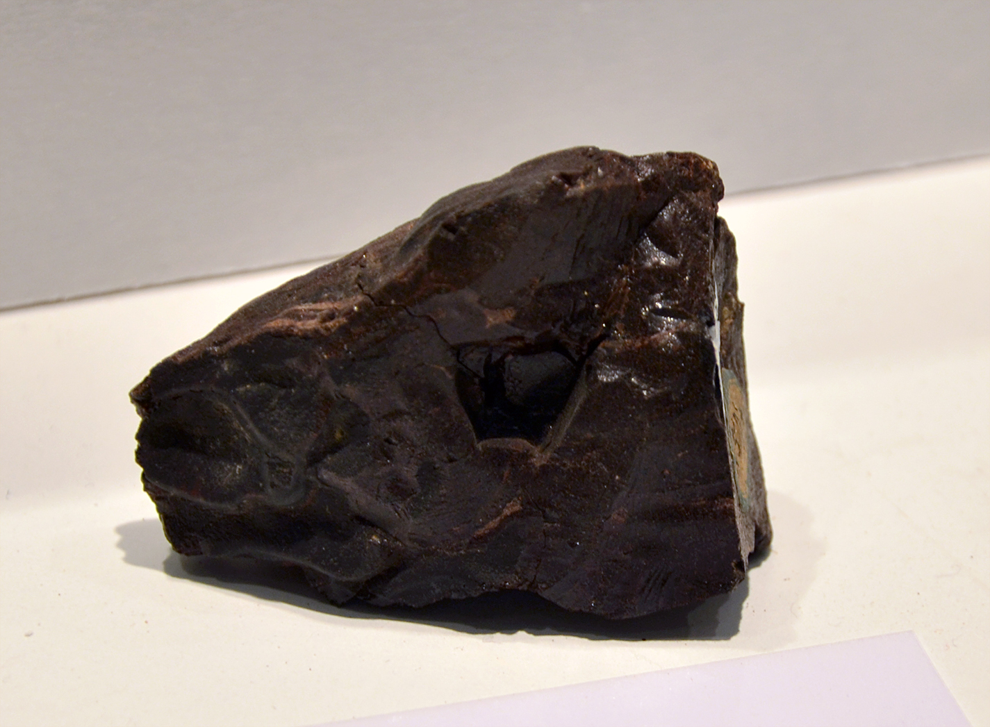 Ozokérite, de provenance inconnue. Musée d'histoire naturelle de Lille